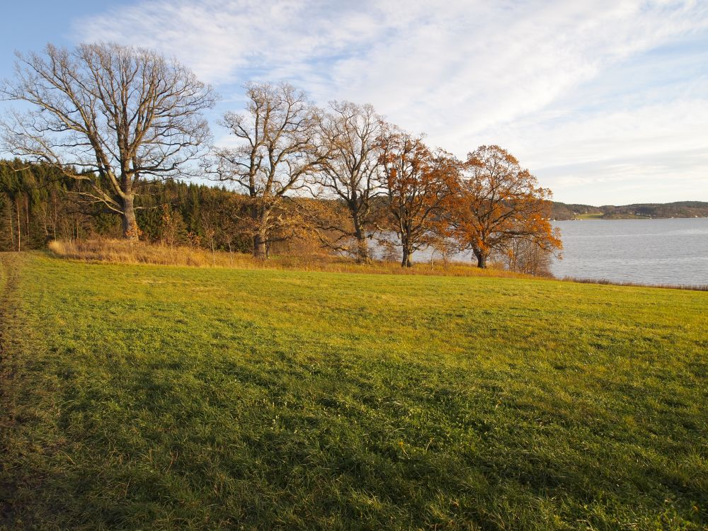 Verneområdet på Melsom er todelt, med en større del inne ved båthavna, og en mindre del (bildet) med fem eiketrær litt lenger sør.